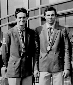 Dinamo - De la stanga la dreapta: Marius Căta-Chițiga, Dan Gîrleanu, sase voleibalisti de la Dinamo de valoare internationala